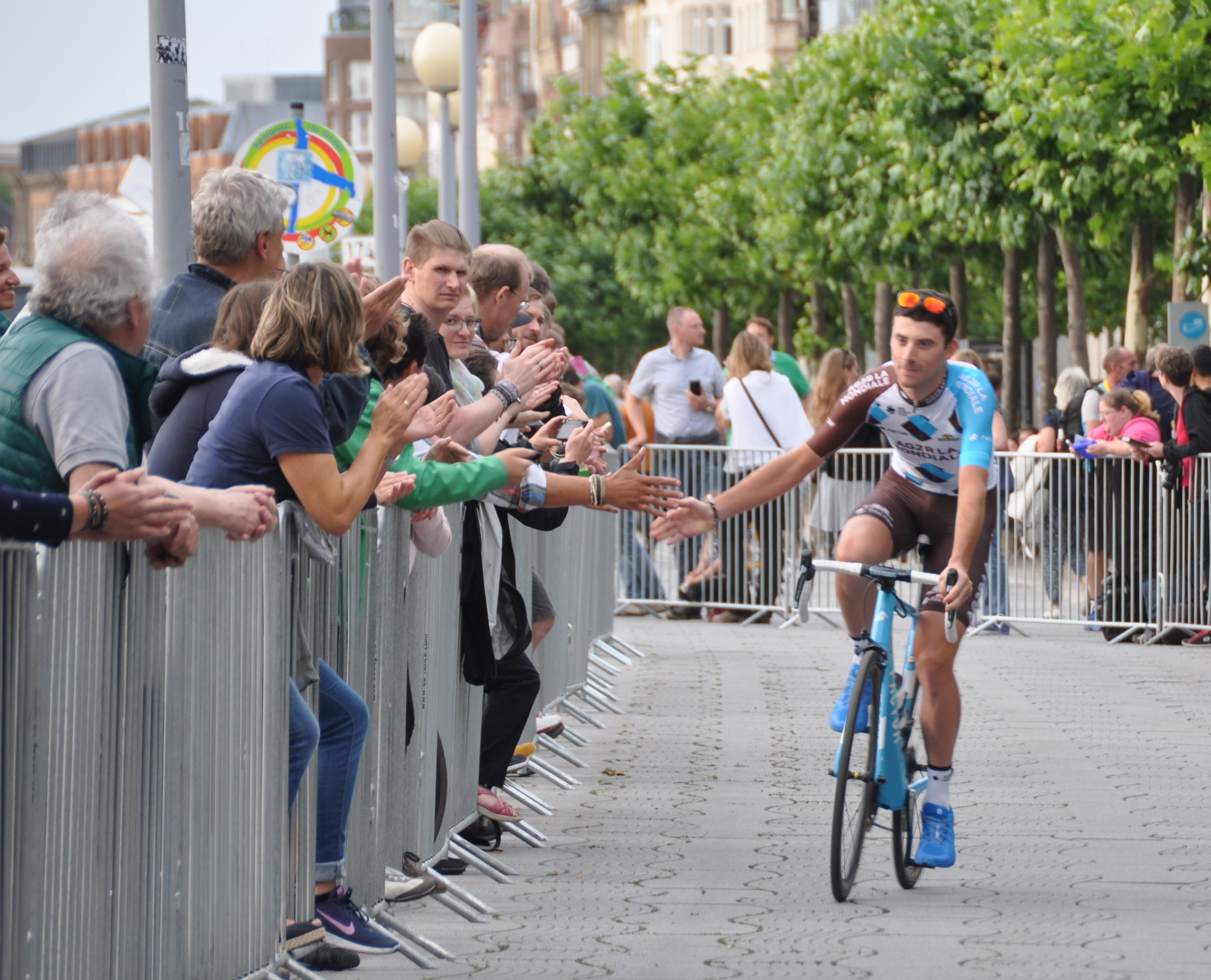 Pierre Latour, französischer Radrennfahrer